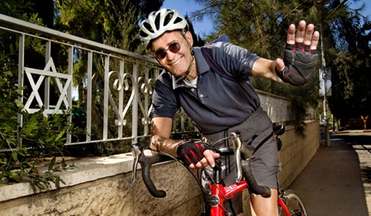 פרופסור לחקר הסרטן חיים סידר